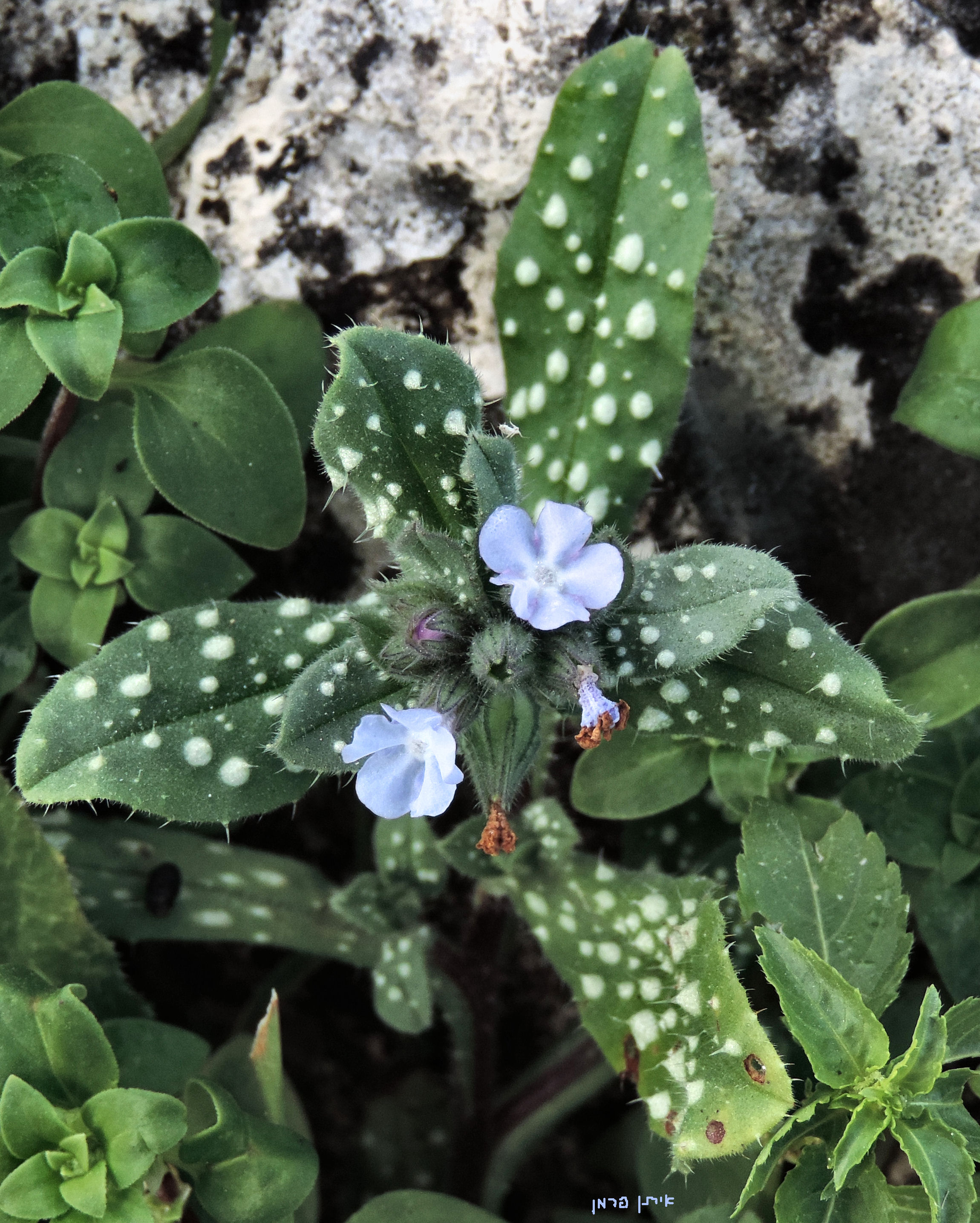 Nonea obtusifolia - Menashe hills נוניאה קהה - ליד עמק השלום